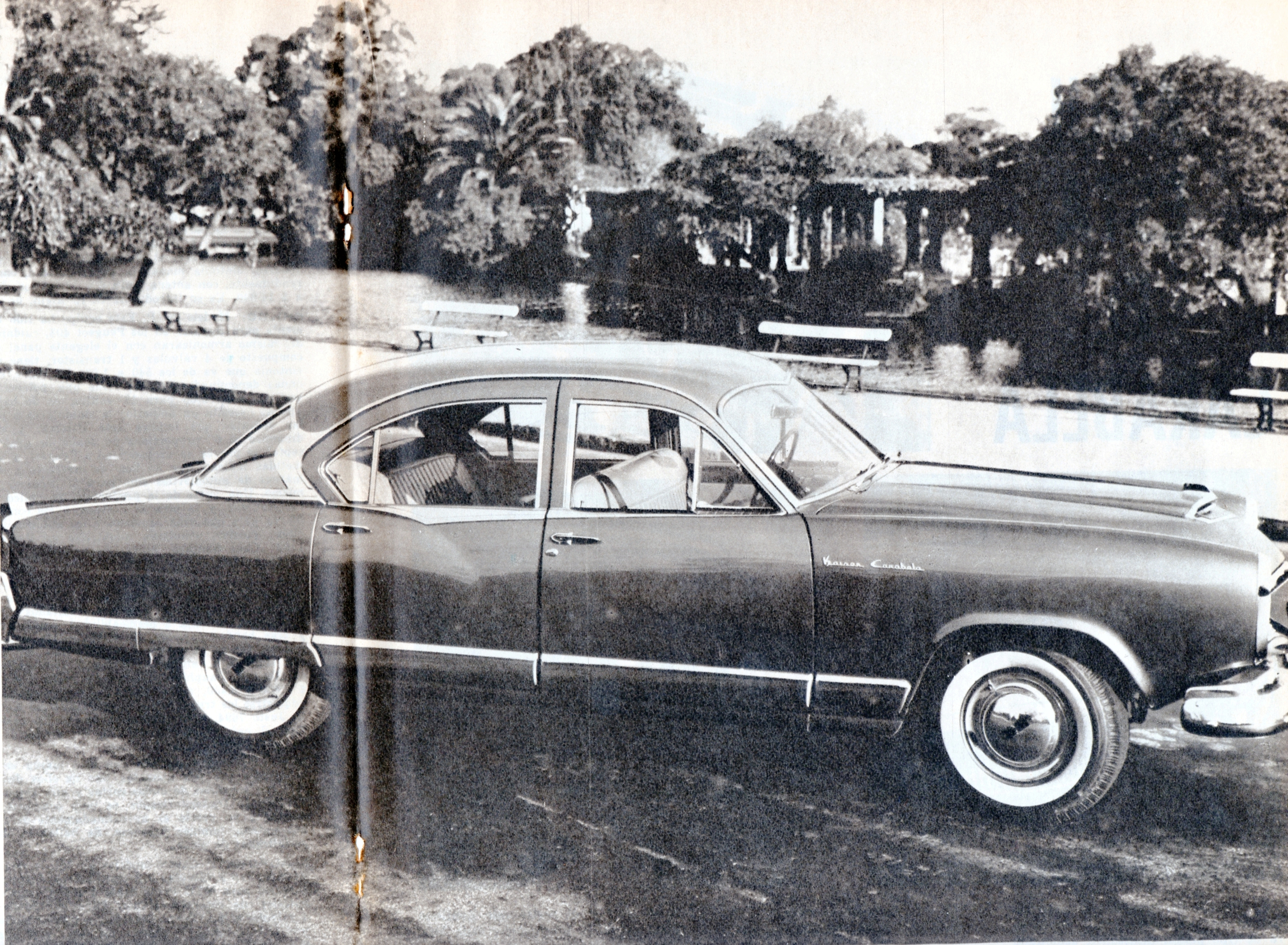 Kaiser Carabela.